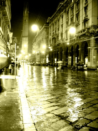 Bologna, Emilia Romagna, Italiapiove in via Rizzoli a Bologna.